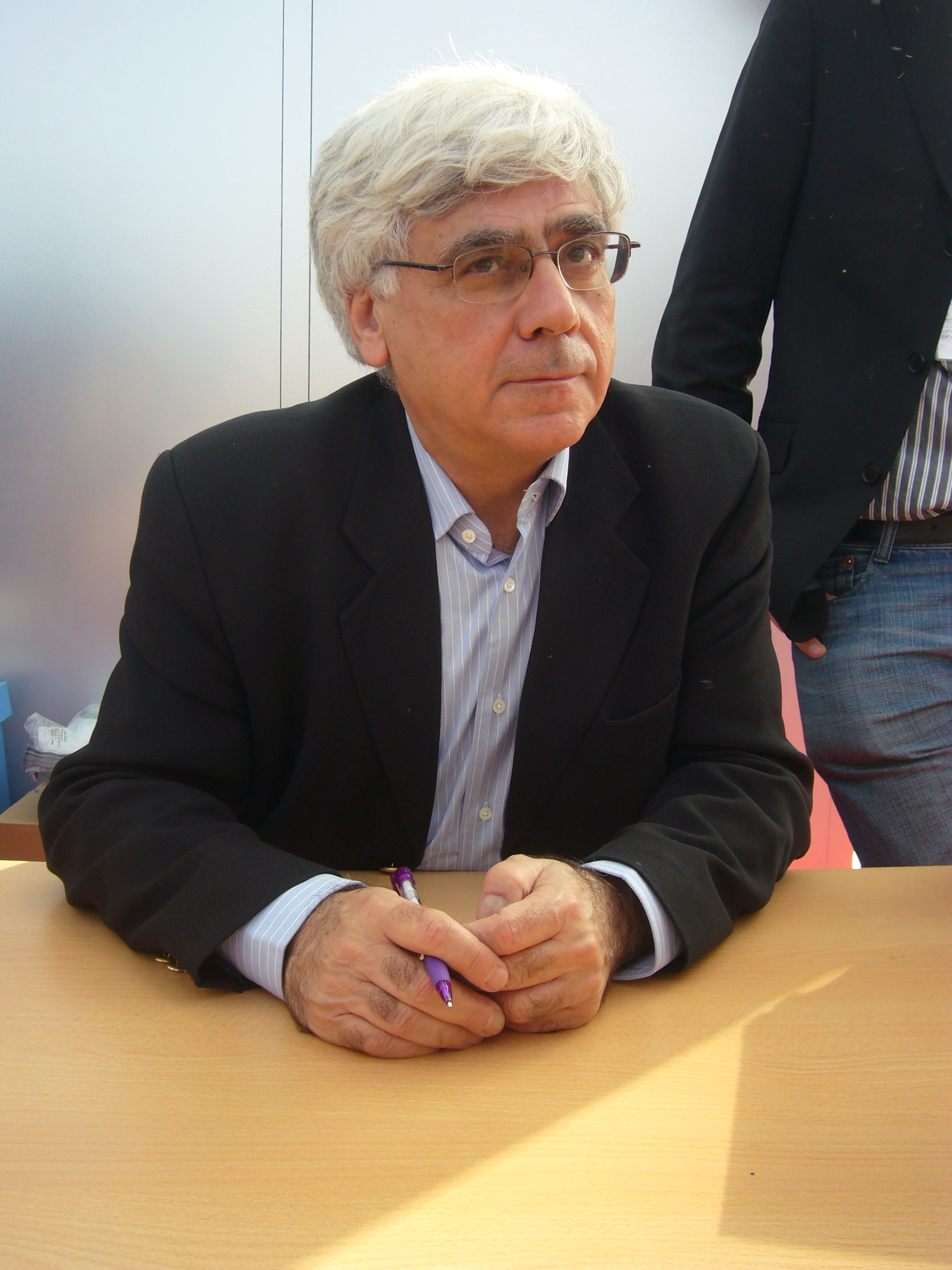 Dieses Fotos dürfen Sie honorarfrei nutzen, wenn Sie folgenden credit beachten: Copyright: Das blaue Sofa / Club Bertelsmann. Sari Nusseibeh, wurde als Sohn wohlhabender Palästinenser 1949 in Damaskus geboren, studierte in Oxford und Harvard islamische Philosophie und kehrte 1978 zurück nach Jerusalem. Er war ein führender Vertreter des gewaltfreien Widerstandes gegen die israelische Besatzung. 2002 ernannte ihn Jassir Arafat zum Repräsentanten der Palästinensischen Befreiungsorganisation (PLO). Seit 1995 ist Nusseibeh Präsident der Al-Quds-Universität in Jerusalem.